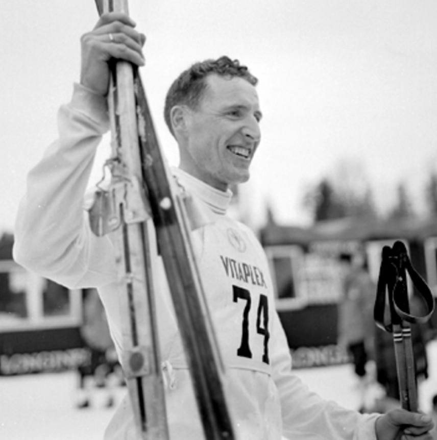 Ole Ellefsæter